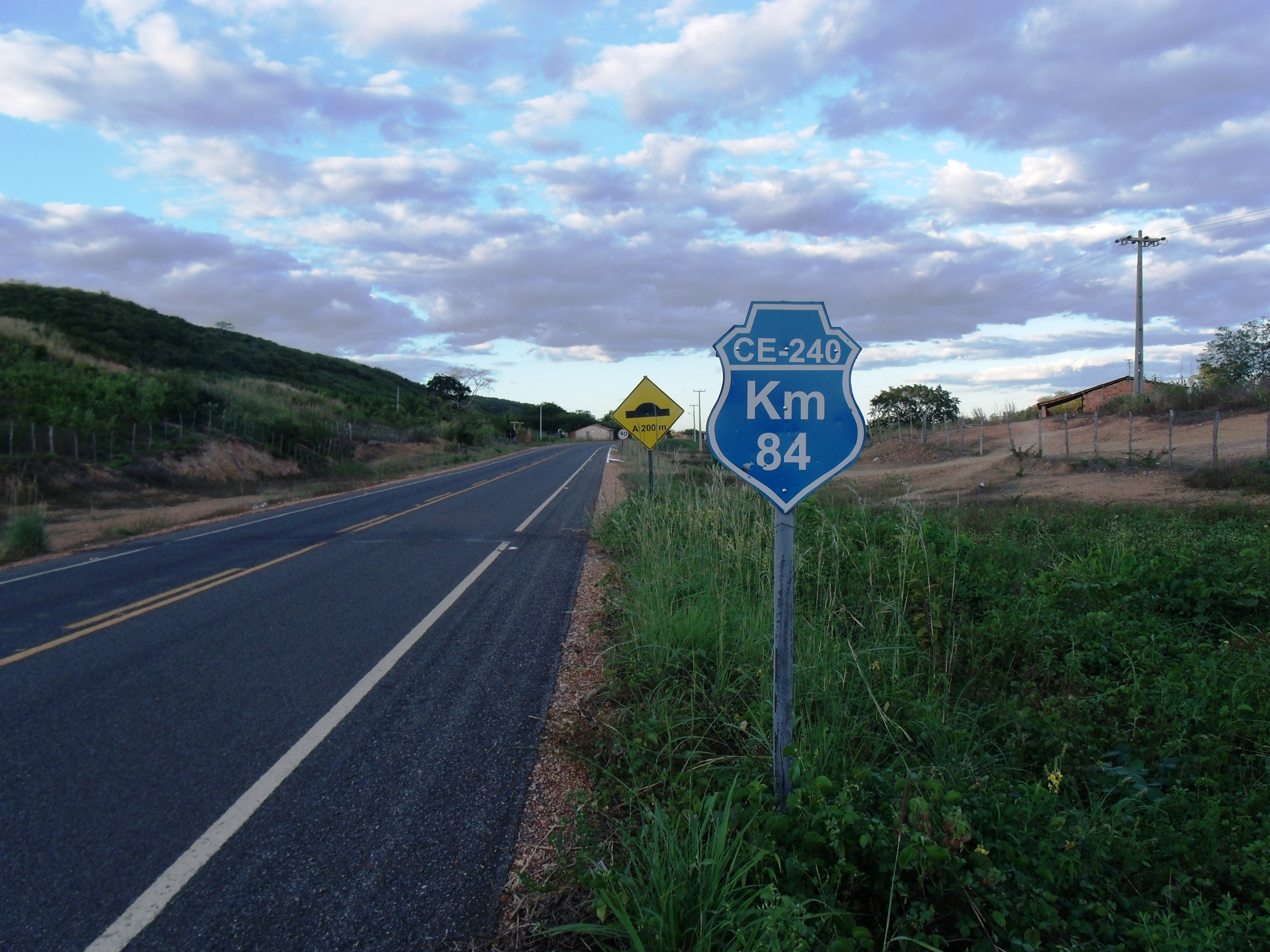 Imagem do trecho com placa do Km 84 da rodocia CE-240 em Coreaú, no Ceará.